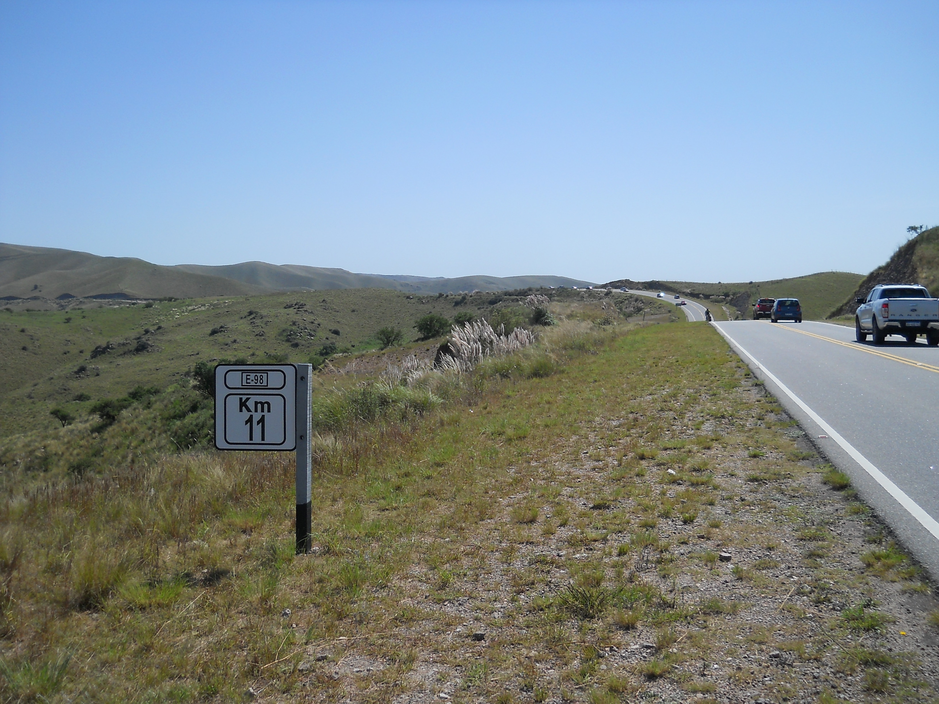 Porción de la ruta en la parte mas alta